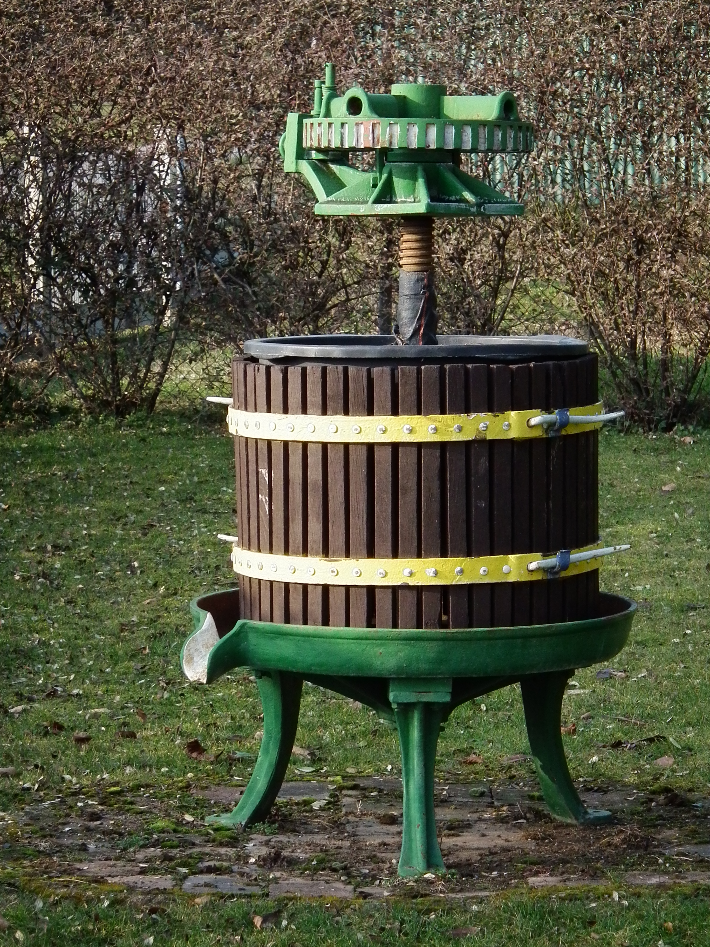 Spindelkelter, fotografiert in Malsch (Rhein-Neckar-Kreis, Baden-Württemberg, Deutschland)